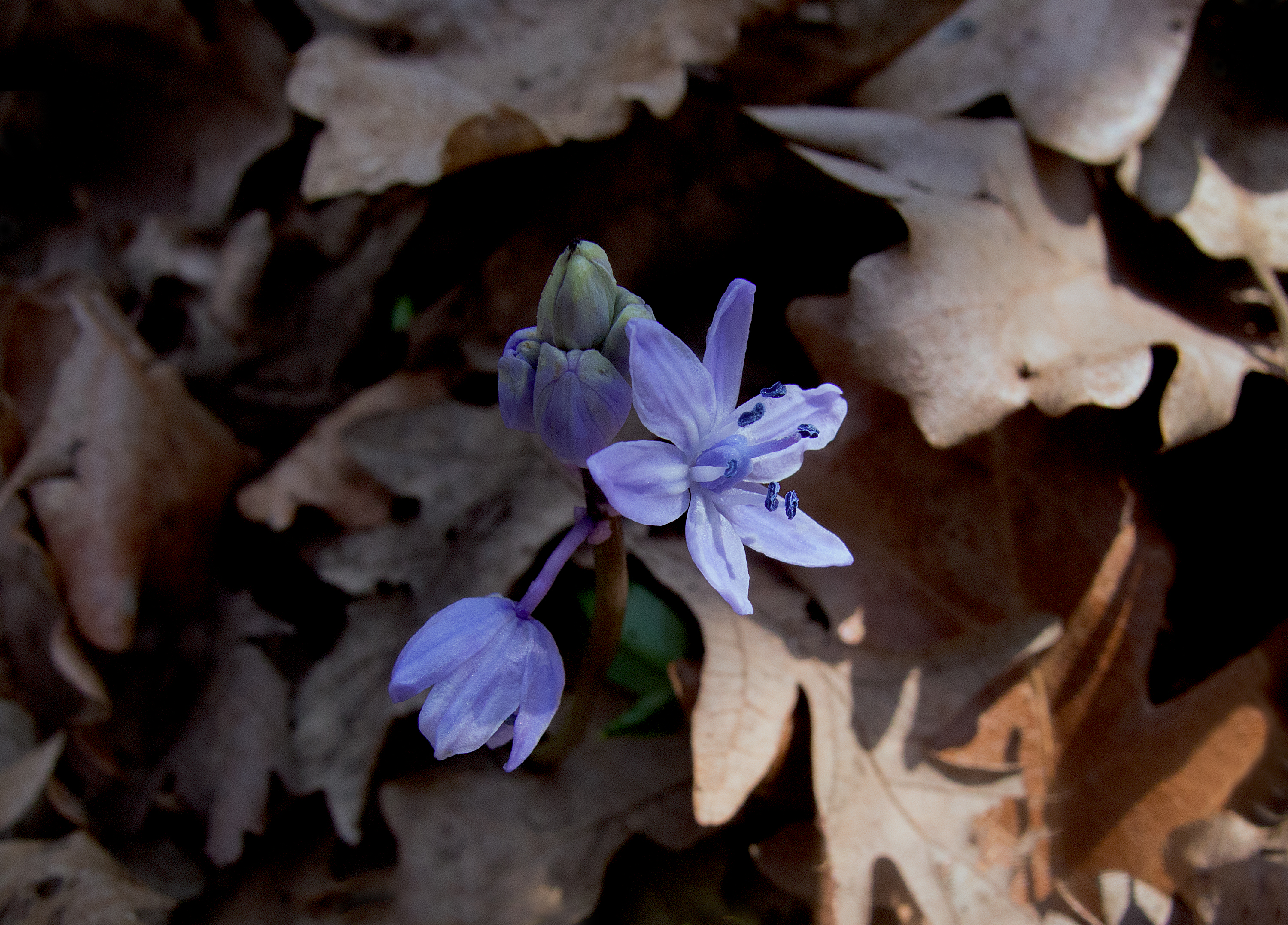 Беглик таш – Ропотамо,Битински_синчец